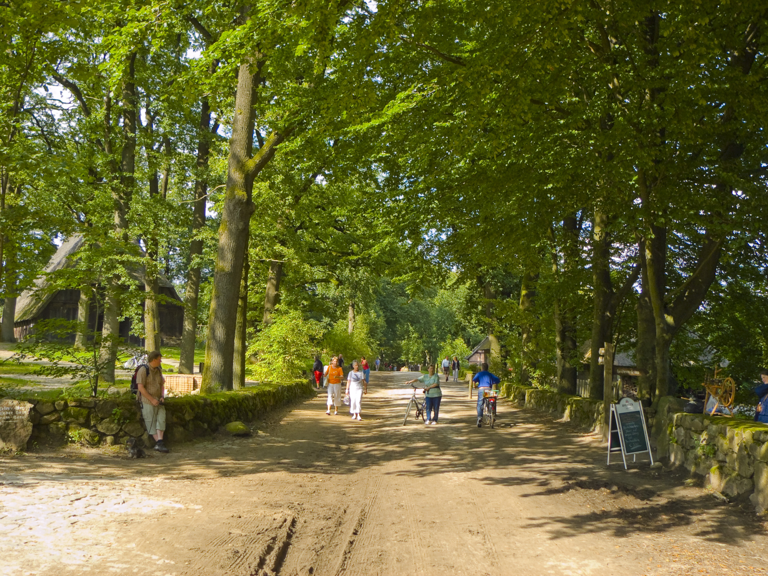 Wilsede